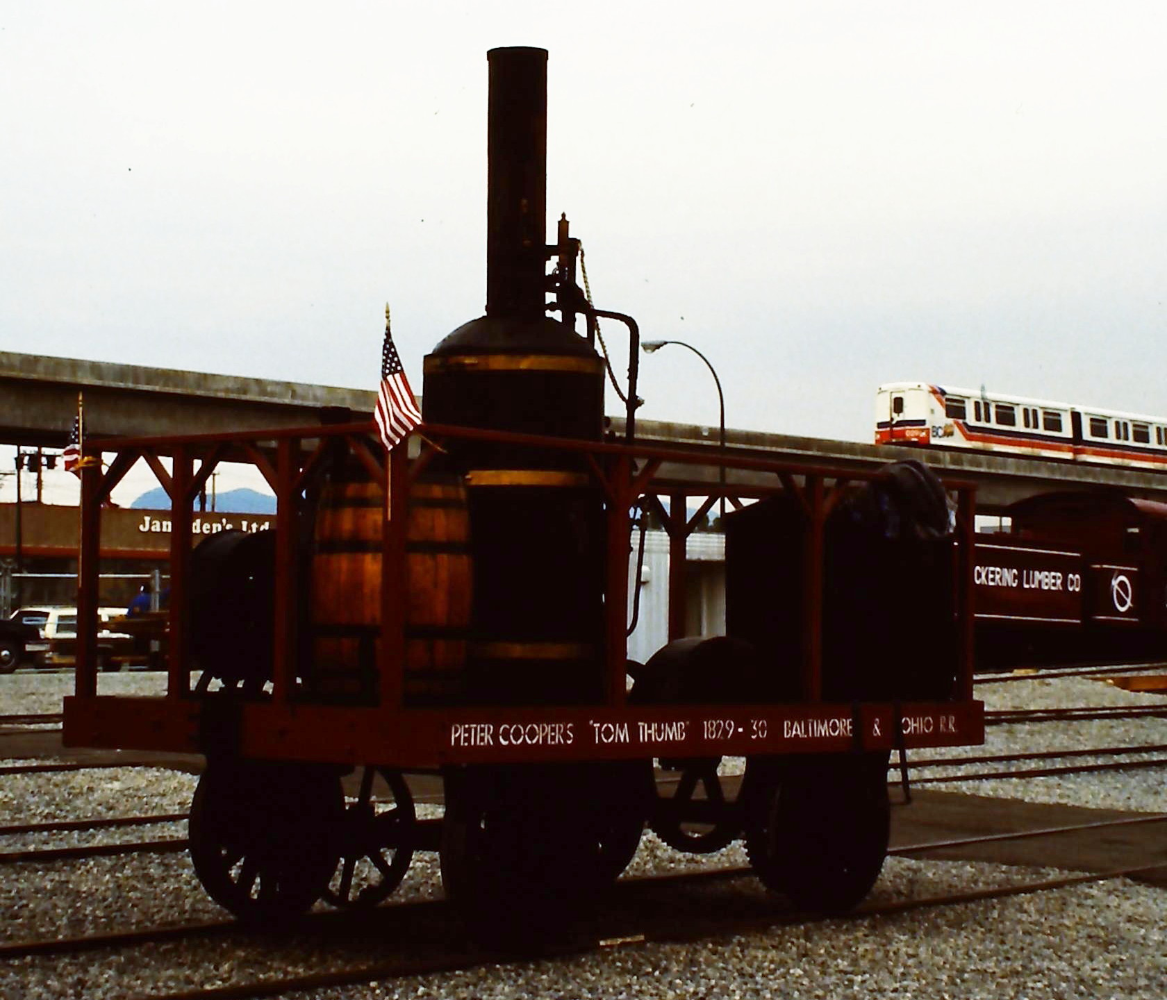 Dampflokomotive Tom Thumb auf der SteamExpo 86